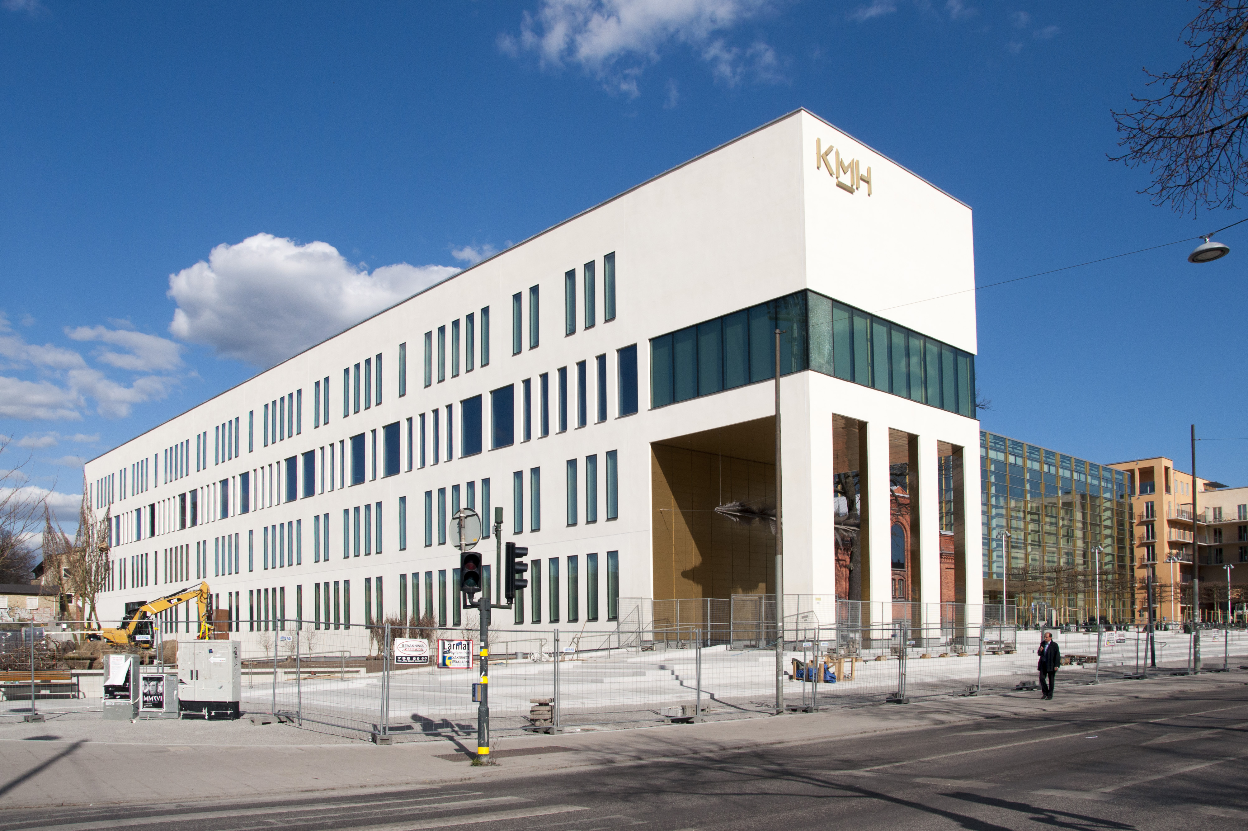 Kungliga Musikhögskolan i Stockholm, 2016. Arkitekter AIX arkitekter.